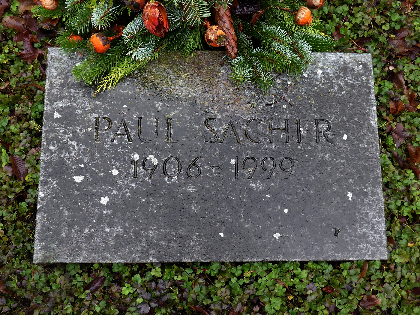 Paul Sacher (1906–1999) Dirigent, Förderer moderner Musik, Mäzen, Grab auf dem Friedhof Hörnli, Riehen, Basel-Stadt